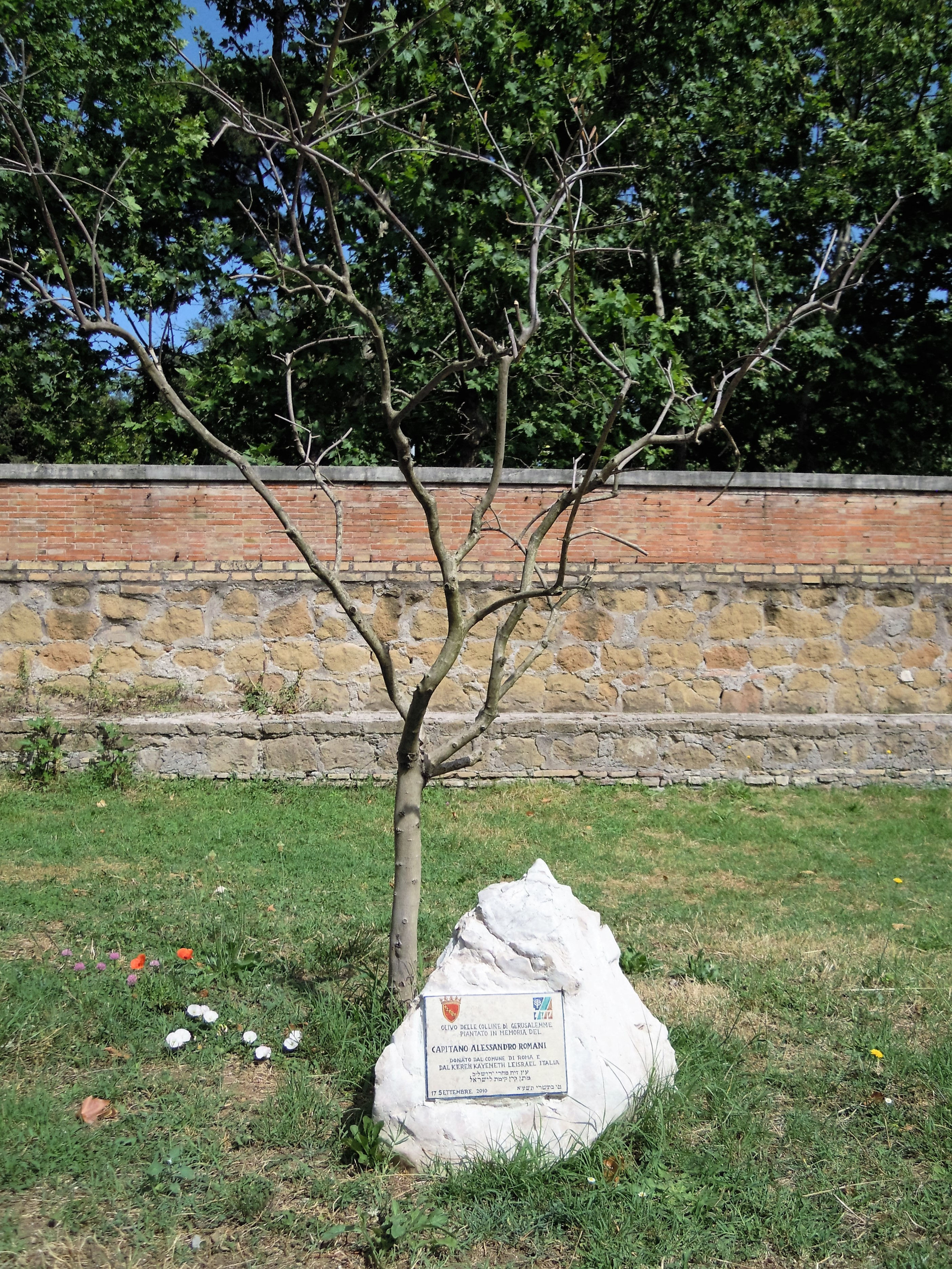 Roma, Villa Torlonia: olivo delle colline di Gerusalemme piantato in memoria del capitano Alessandro Romani (1974-2010)